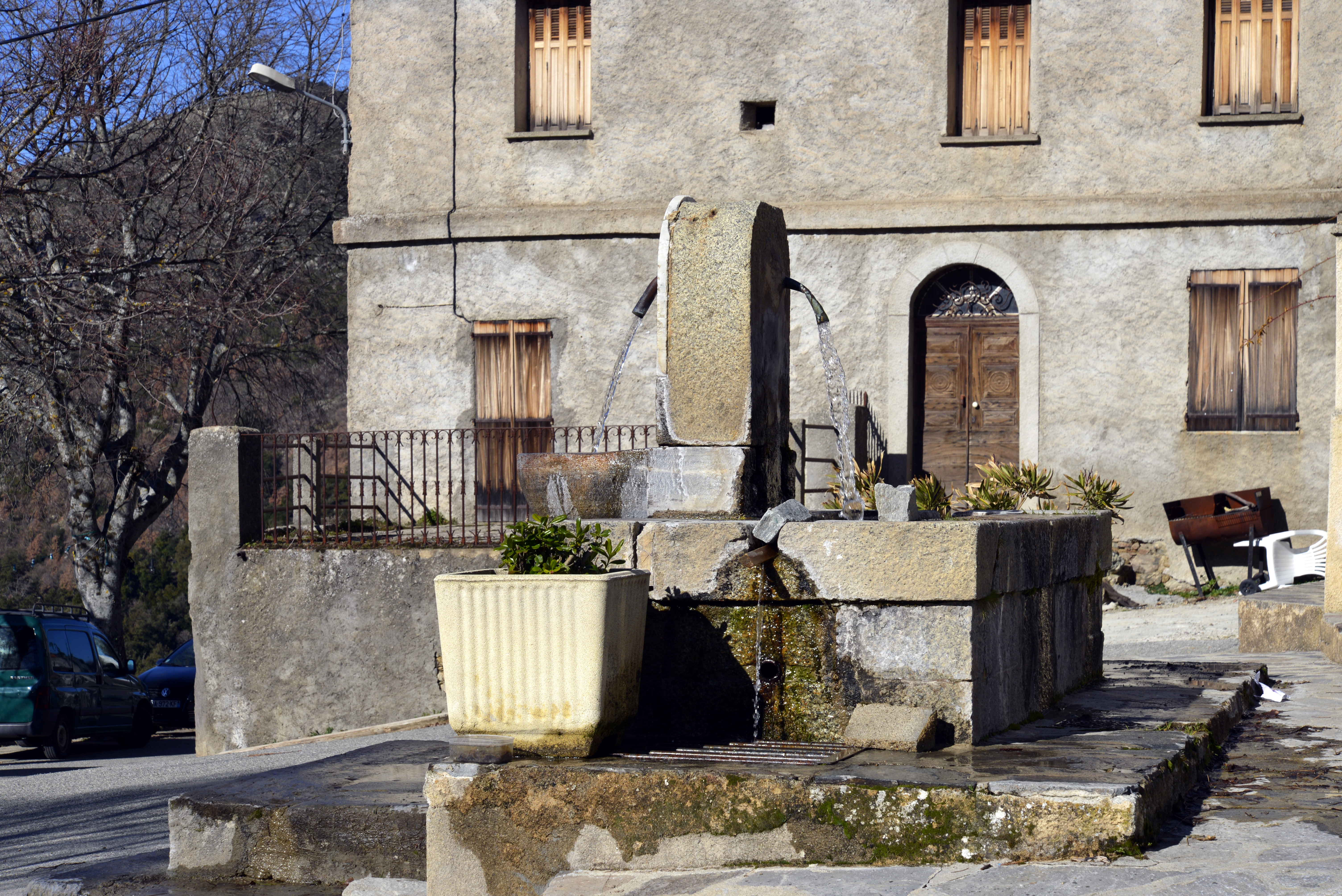 Santa-Lucia-di-Mercurio, Bozio (Haute-Corse) - Fontaine dite funtana di a piazza édifiée en 1895. Elle porte gravée la reconnaissance au maire Zuccarelli et à son adjoint Galvani.